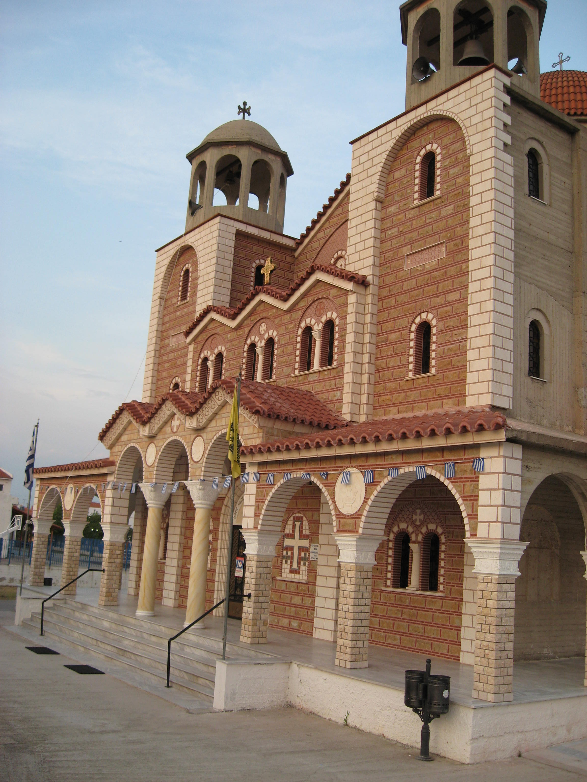 Православна църква в Неа Врасна.